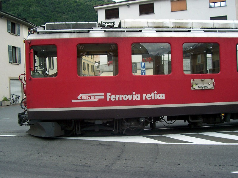 Tirano - Treno della Ferrovia Retica